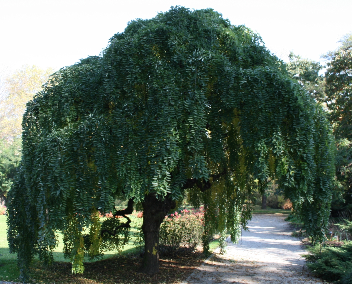 Sophora japonica "Pendula" u listopadu, botanički vrt PMF-a